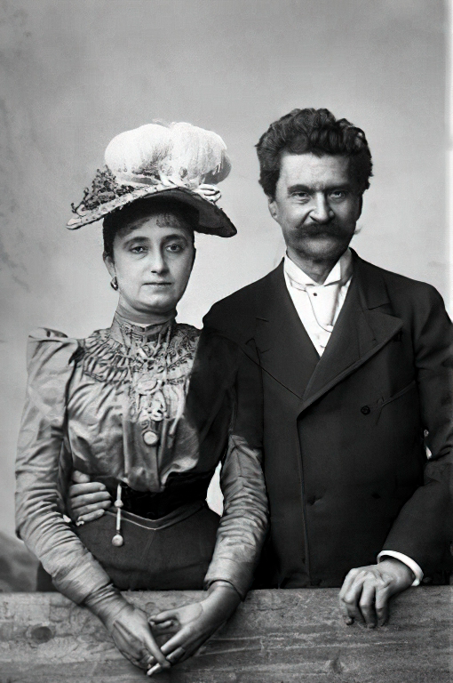 Johann und Adele Strauss in Bad Ischl, um 1895